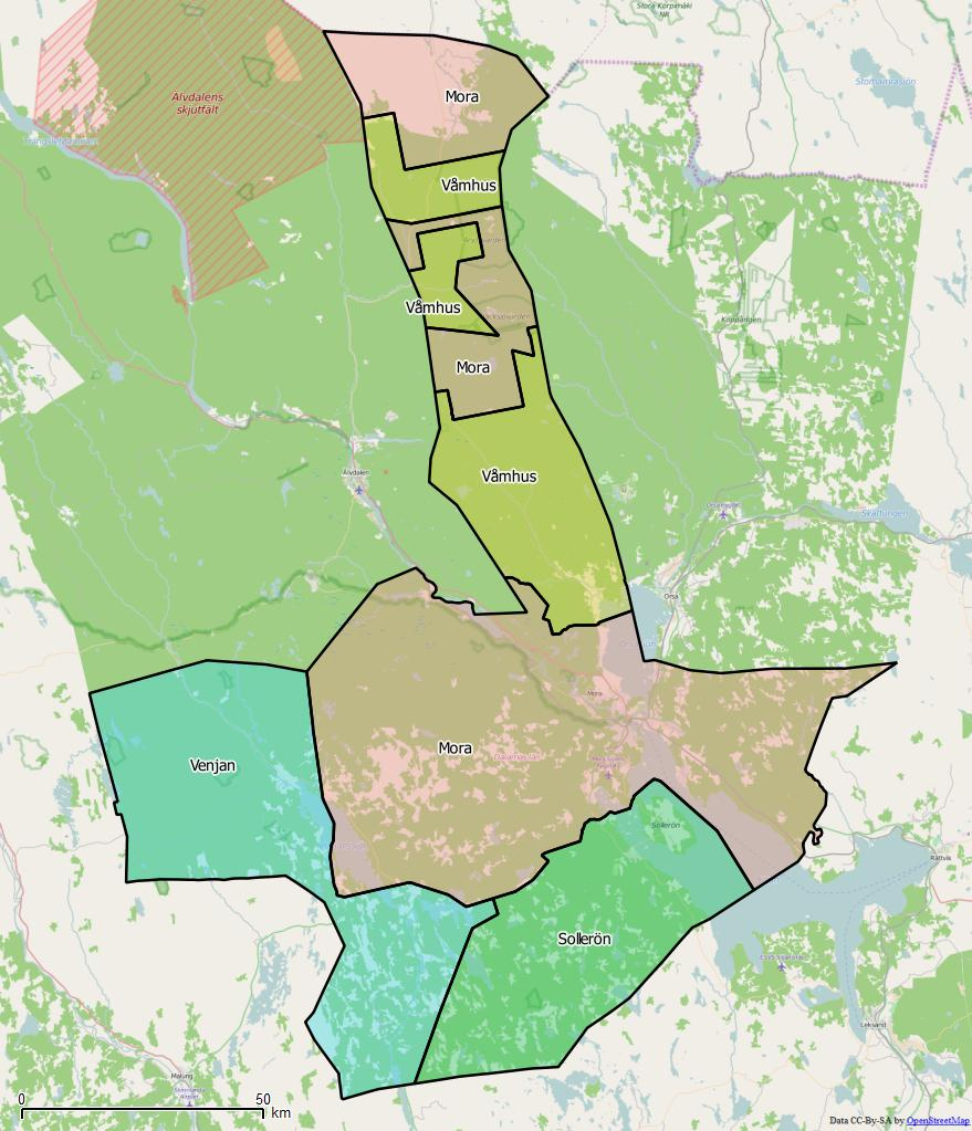 Distriktsindelningen i Mora kommun World file: 228.47688119570821641 0 0 -228.47688119570821641 1489201.95739152817986906 8776268.83352691493928432